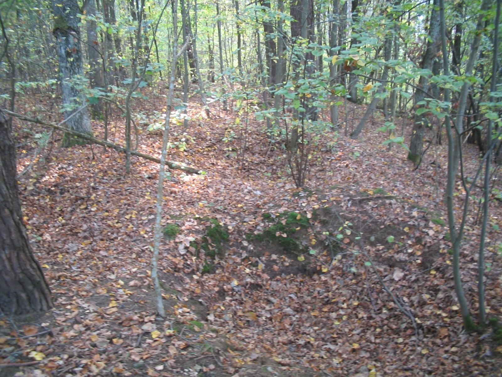 Mataičių kapinynas, Šilutės raj.